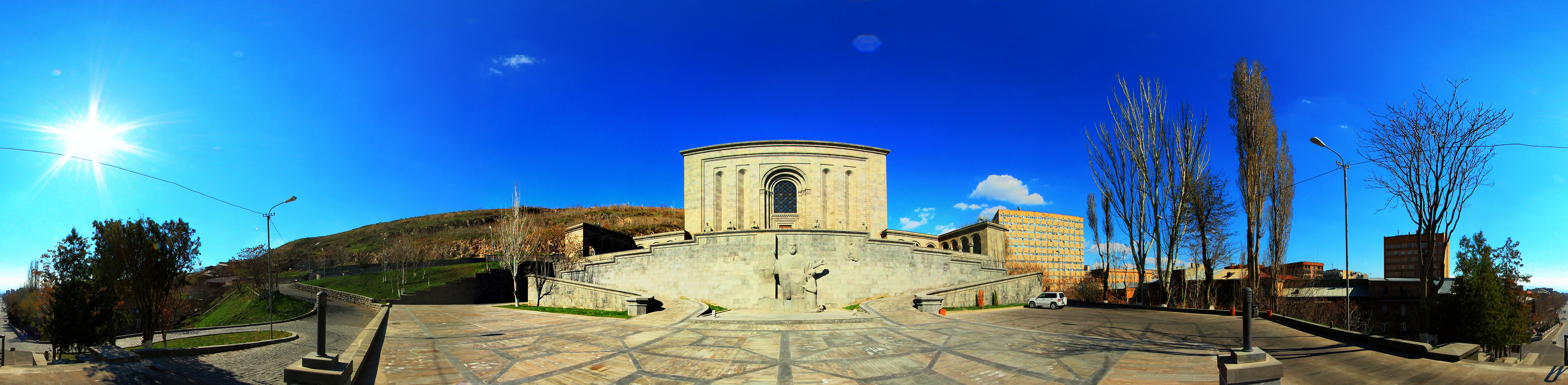 Մատենադարան 360yerevan 6/81